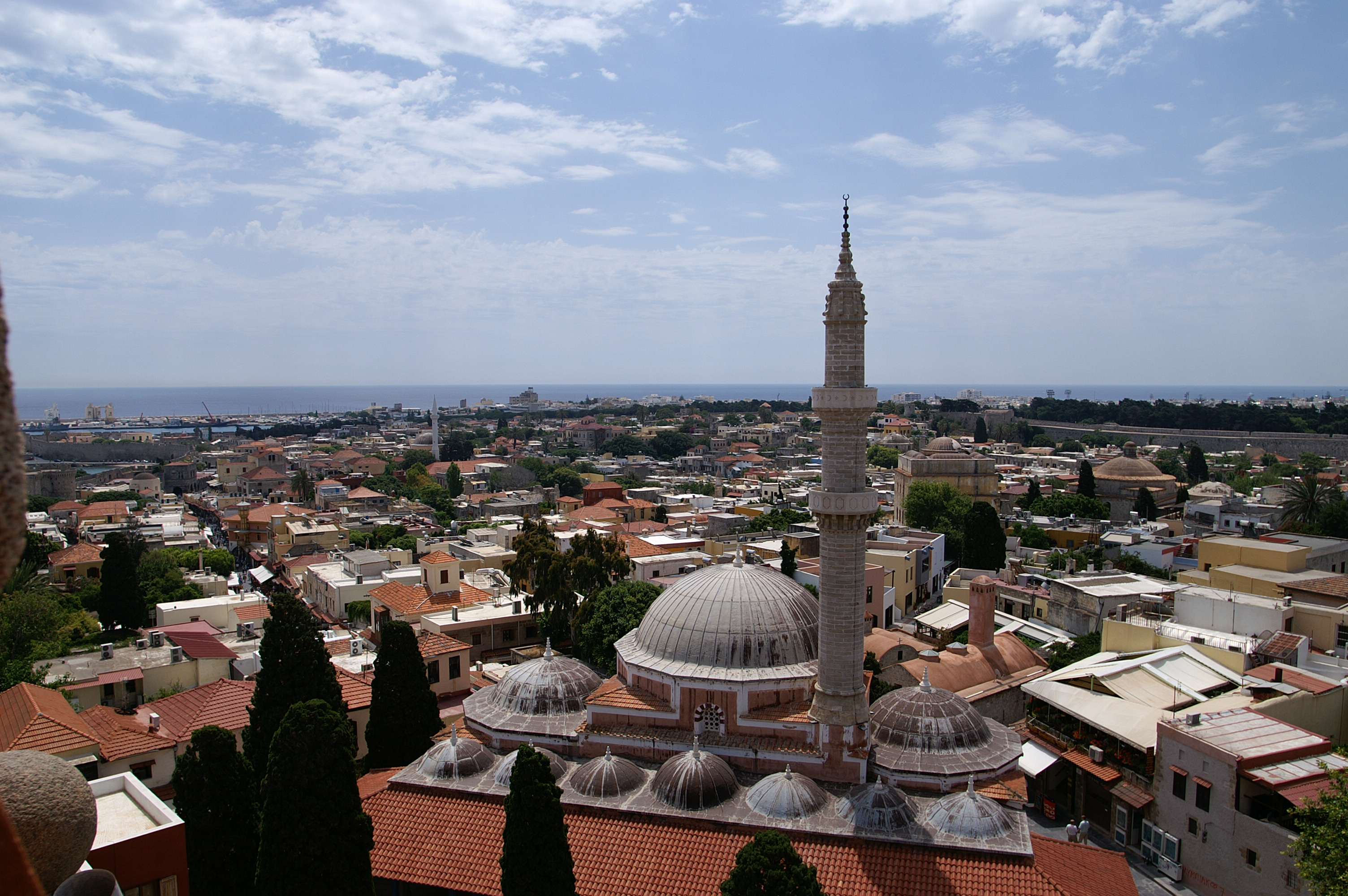 Blick vom höchsten Punkt auf dem Glockenturrm des "ROLOI" Uhrturm in der Altstadt von Rhodos.